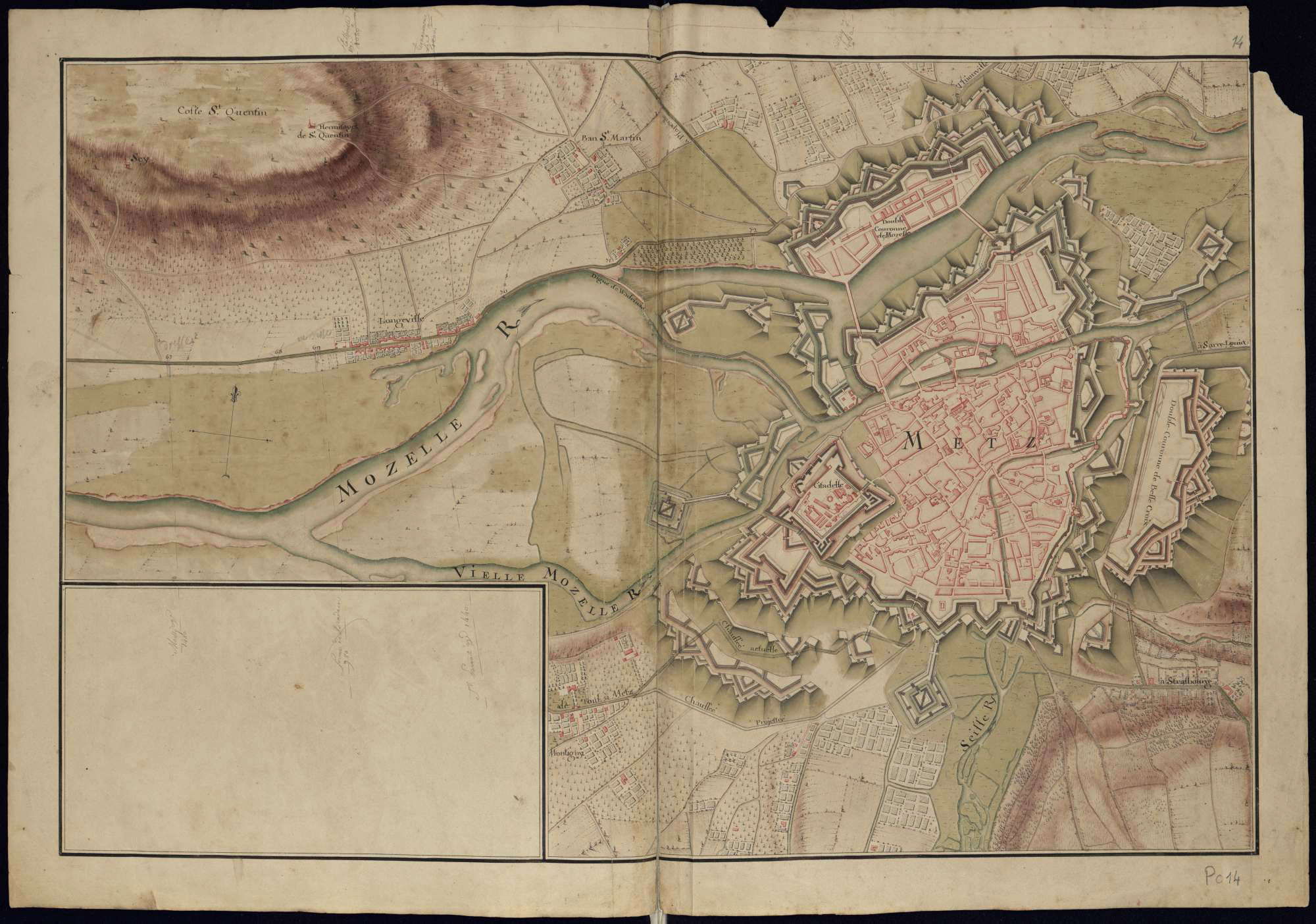 Atlas de Trudaine pour la généralité de Metz. Cartes des Routes du Département des Trois-Evêchés, 1744. N°1.